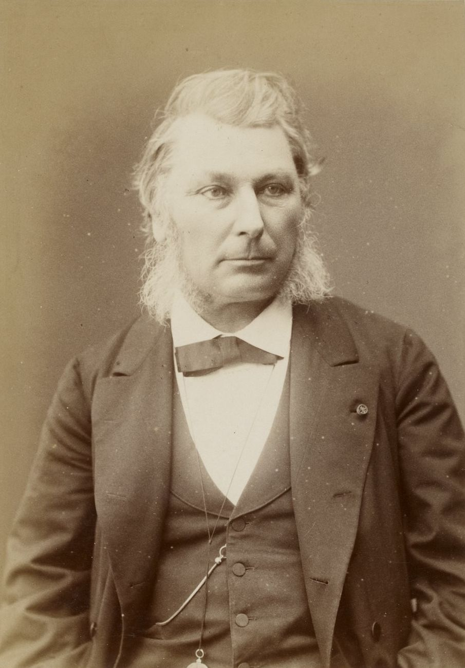 Portrait de l'amiral Mouchez par Eugène Pirou